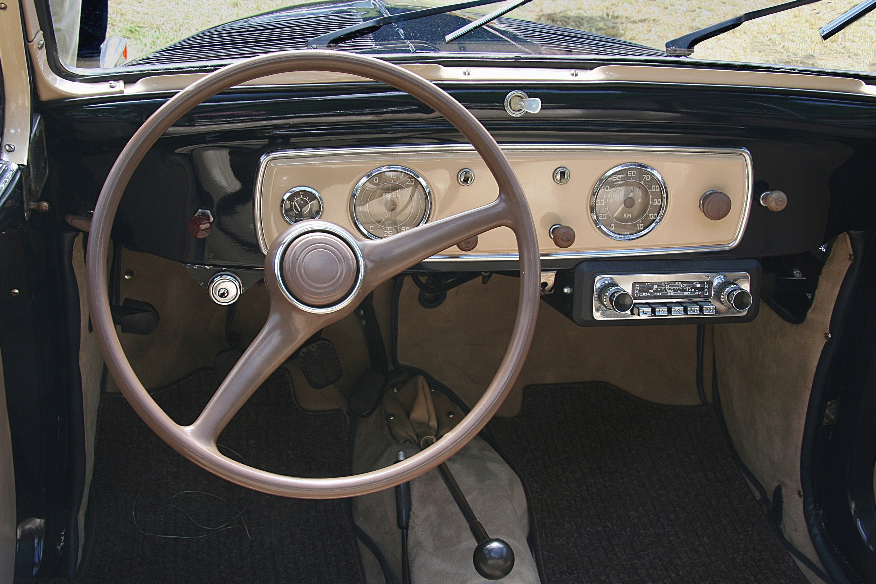 Fiat 500 C „Topolino“, Baujahr 1949, Armaturenbrett